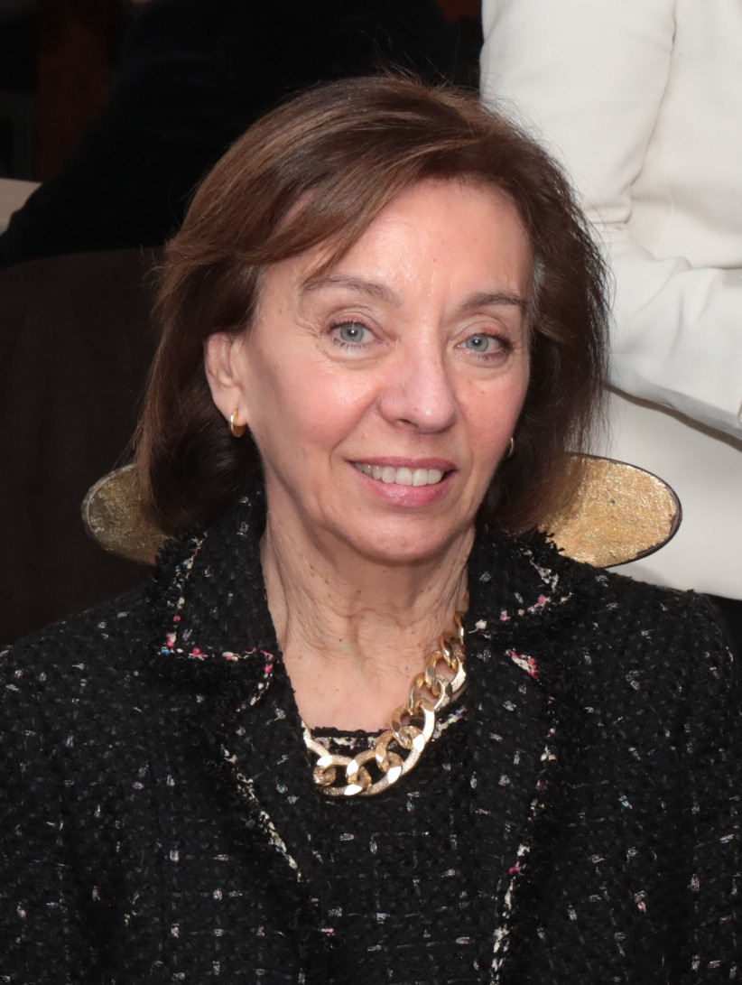 Juan Carlos Vera y Antonio Gonzalez Terol asisten a la tradicional copa de Navidad del municipio madrileño de Boadilla del Monte.